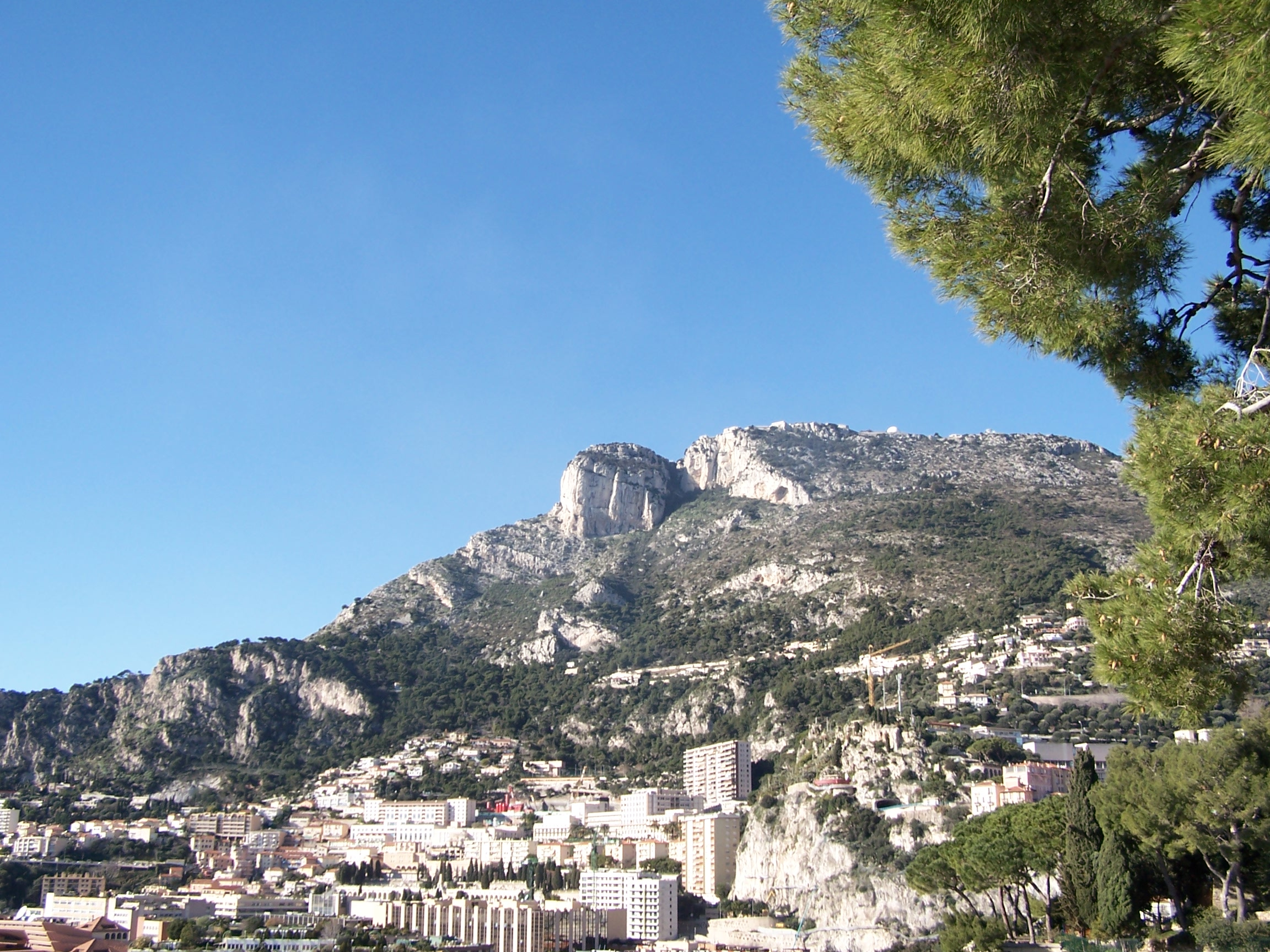 La Tête de Chien vue depuis le Rocher de Monaco. Photo prise personnellement.